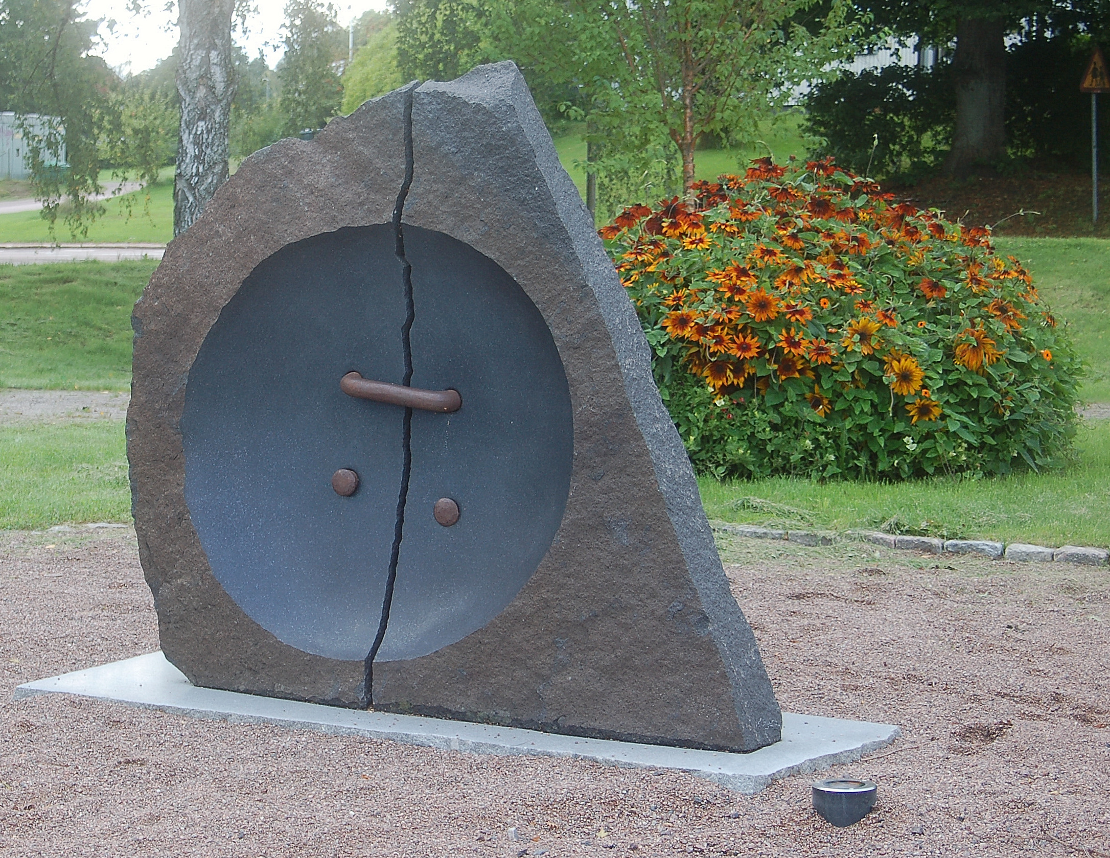 "Black Button" av Hiroshi Koyama placerad utanför Järnvägstationen i Edsvalla